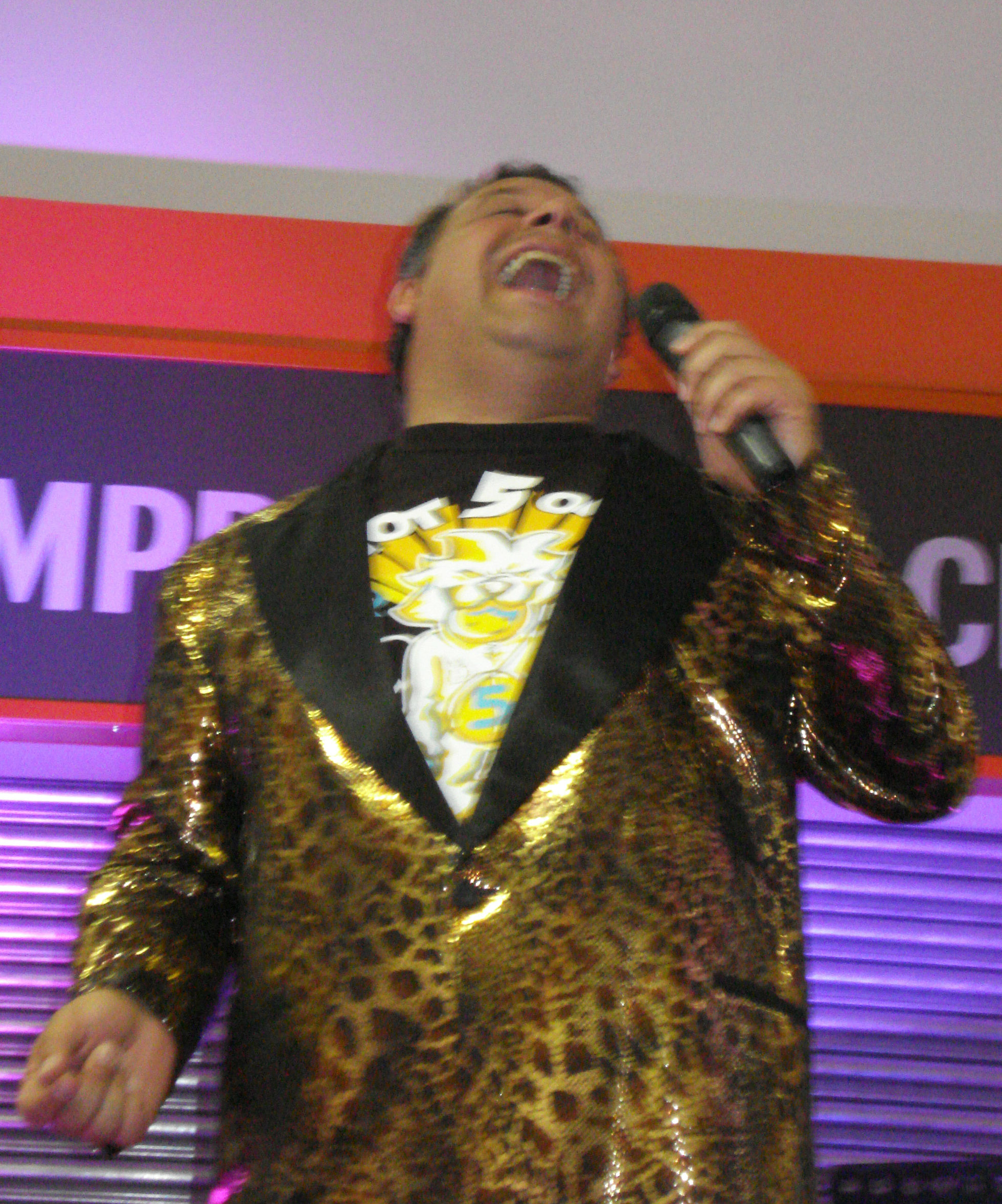 Guillermo Andrés González Bravo, alias Willy Sabor, es un humorista, locutor de radio y cantante chileno. Nació en Santiago de Chile el 15 de septiembre de 1969.